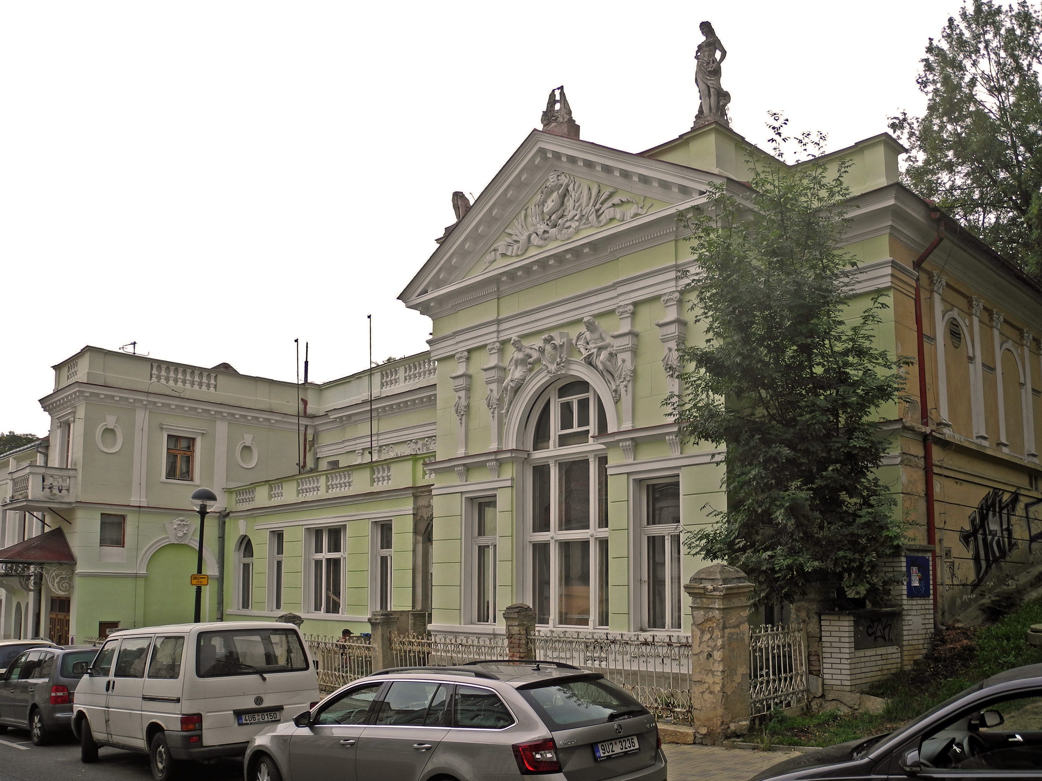 Ehem. Vereinshaus „Lindenhof“ in Teplitz, Architekt: Max von Loos (1897/98) – Neorenaissance, jetzt Wohnhaus in Teplice, Lipová 239/2